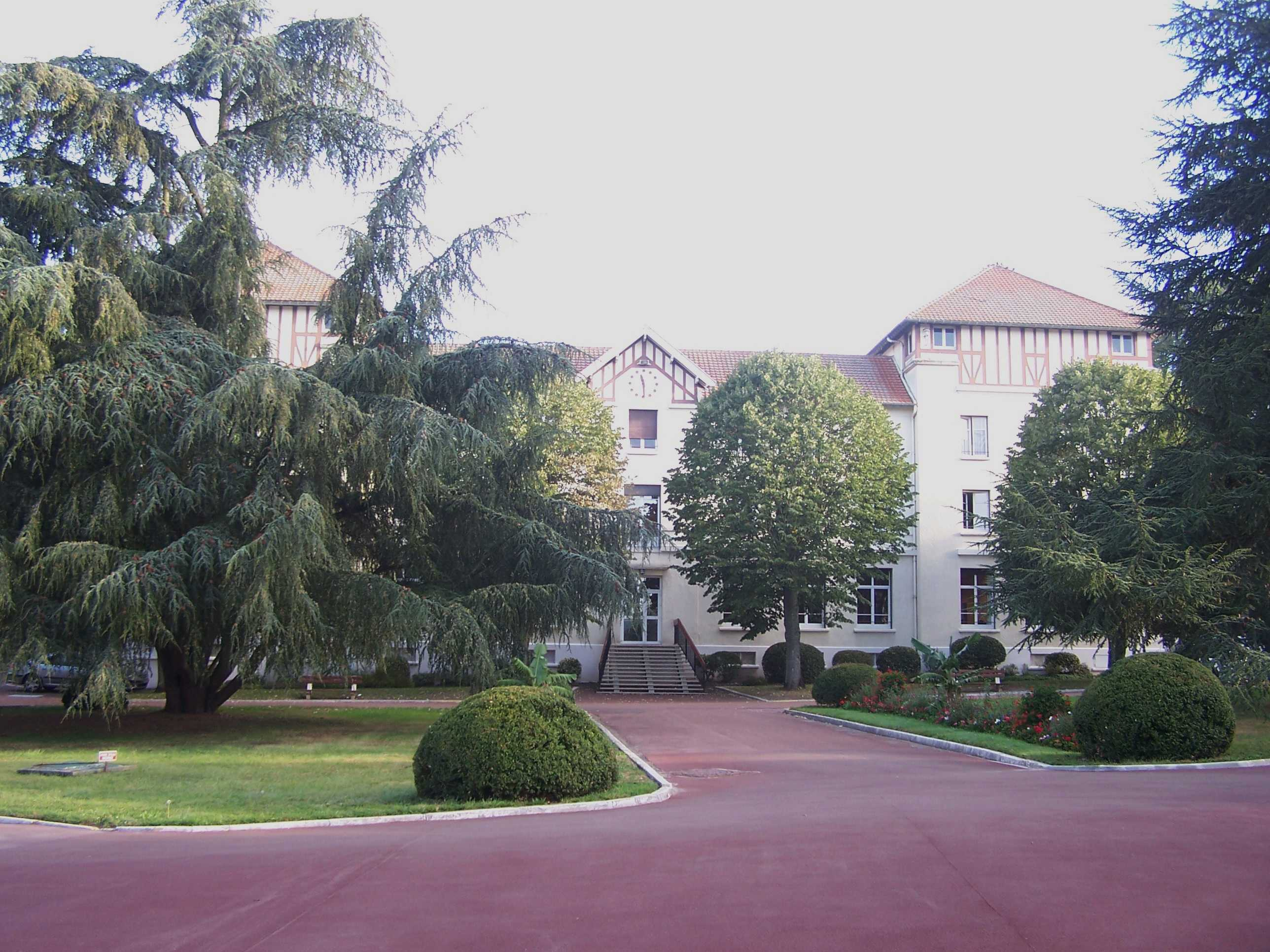 Hôpital pédiatrique de Bullion (Yvelines, France)